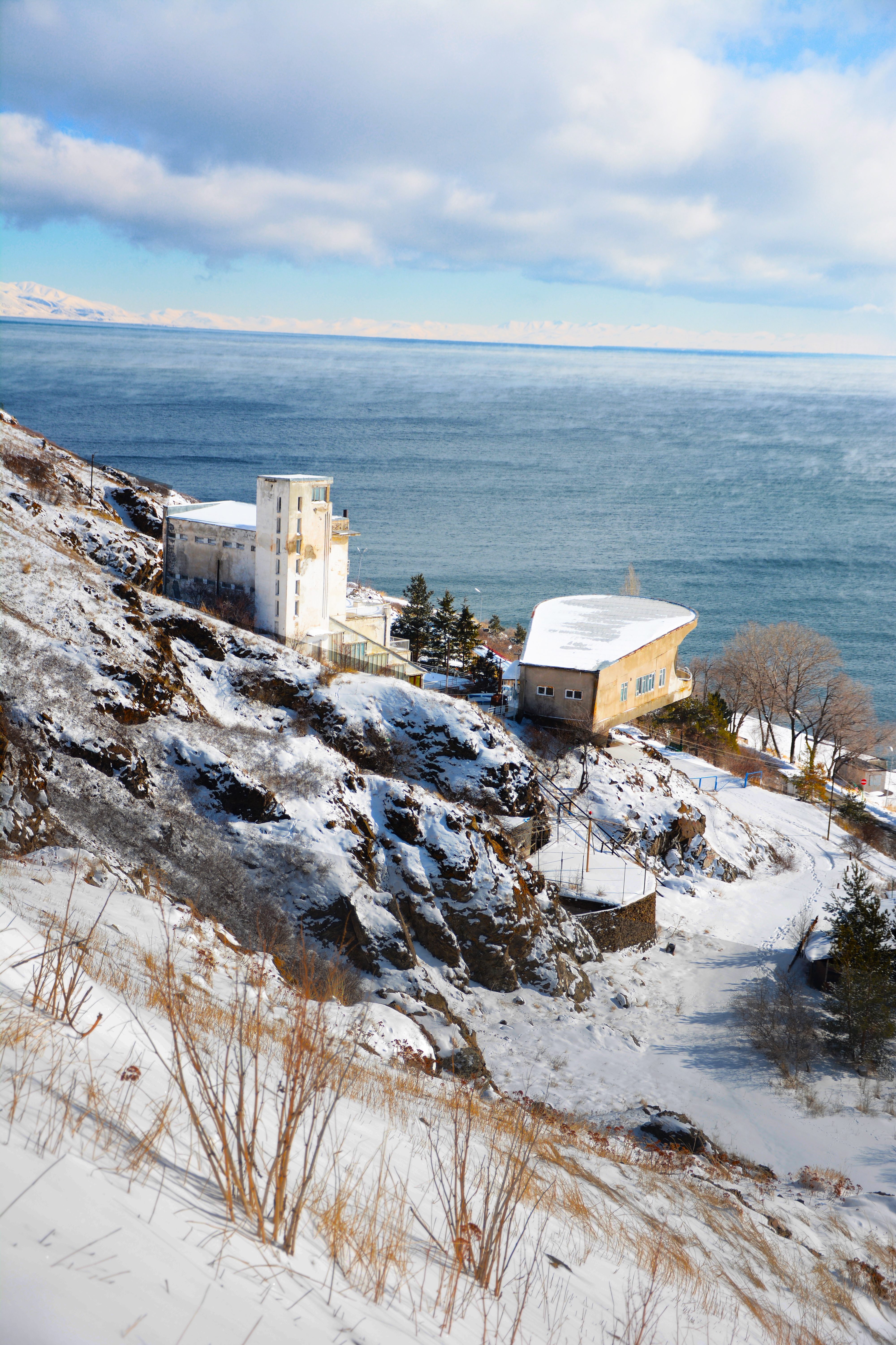 Սևանա լճի ավազան, շրջափակված է Արեգունի, Գեղամա, Վարդենիս, Փամբակ և Սևան լեռնաշղթաներով, 2000 մ ծ.մ բարձր. Սահմաններում։